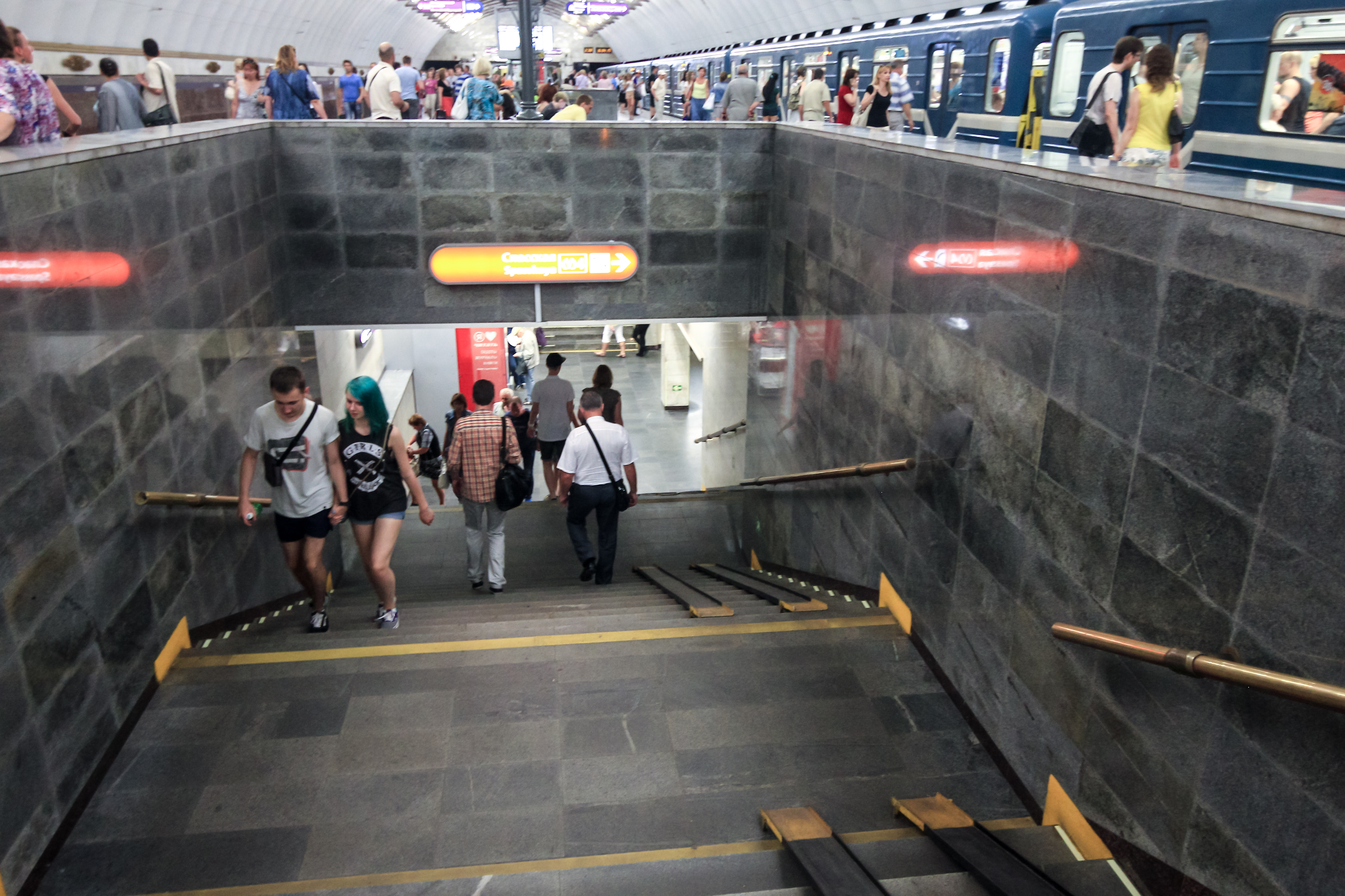 Садовая (станция метро)